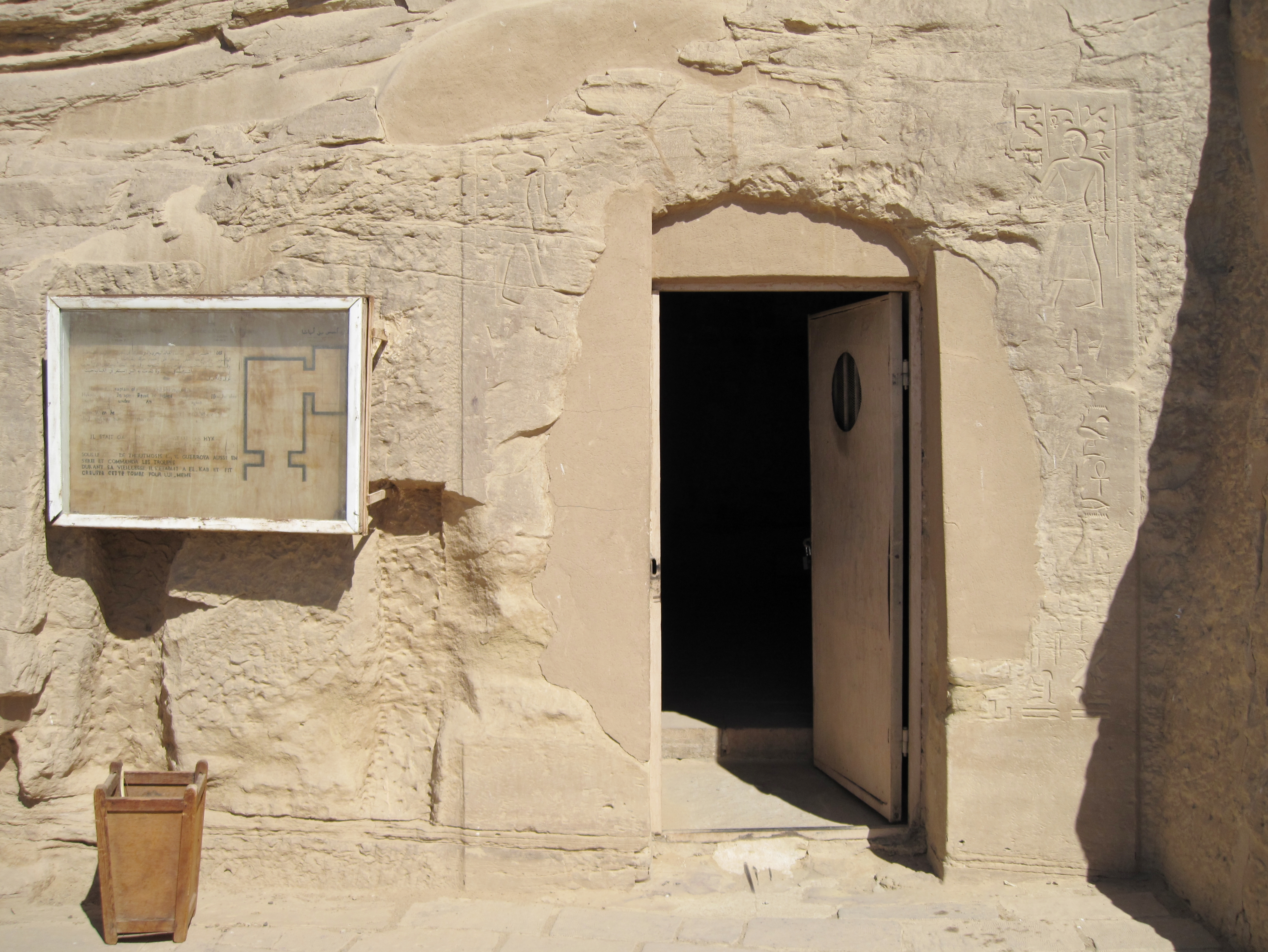 Eingang zum Felsengrab des Ahmose, Sohn von Ibana, unter den Felsengräbern des altägyptischen Necheb bei el-Kab, Ägypten